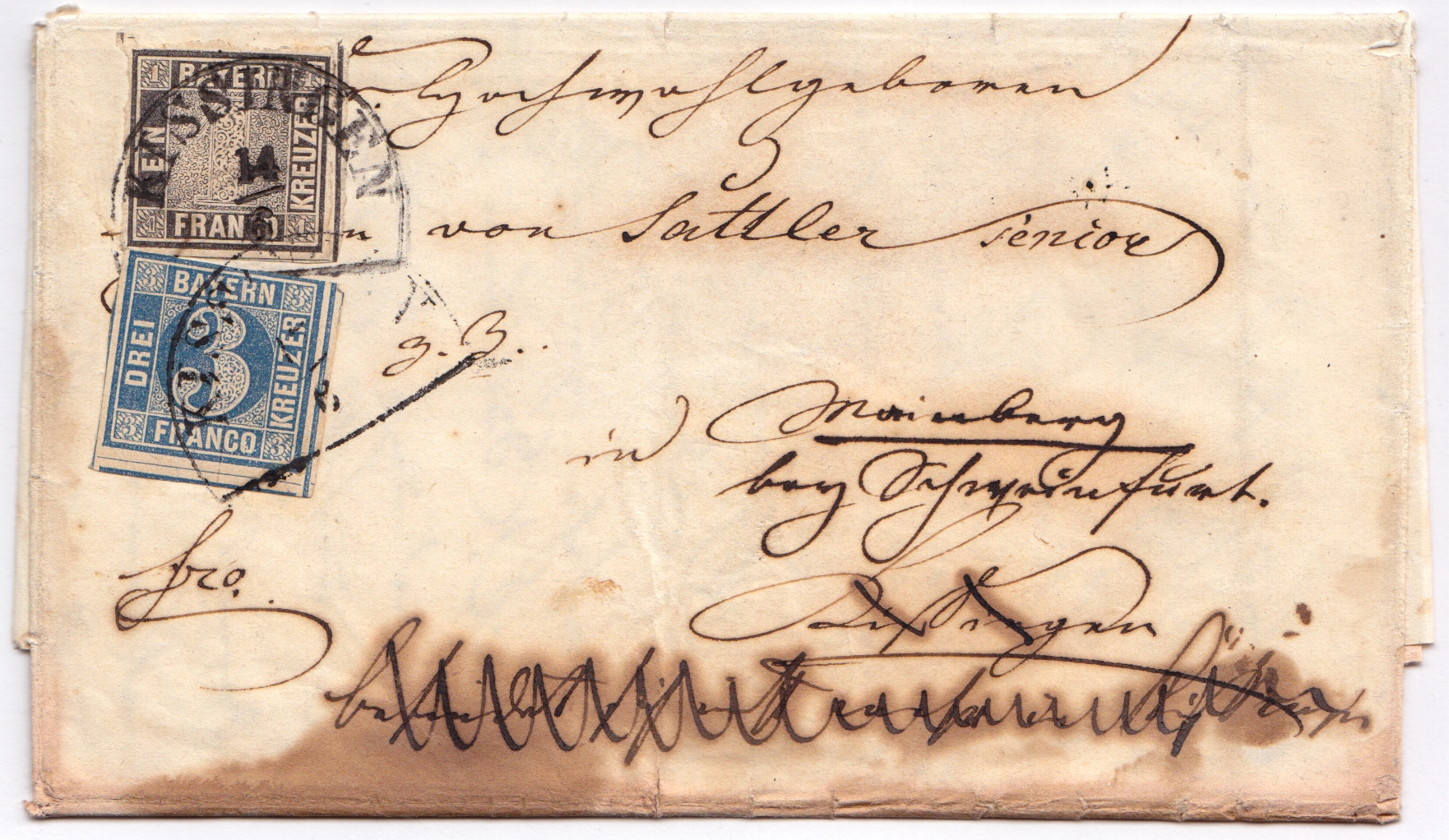 Brief an Wilhelm Sattler (1784-1859)